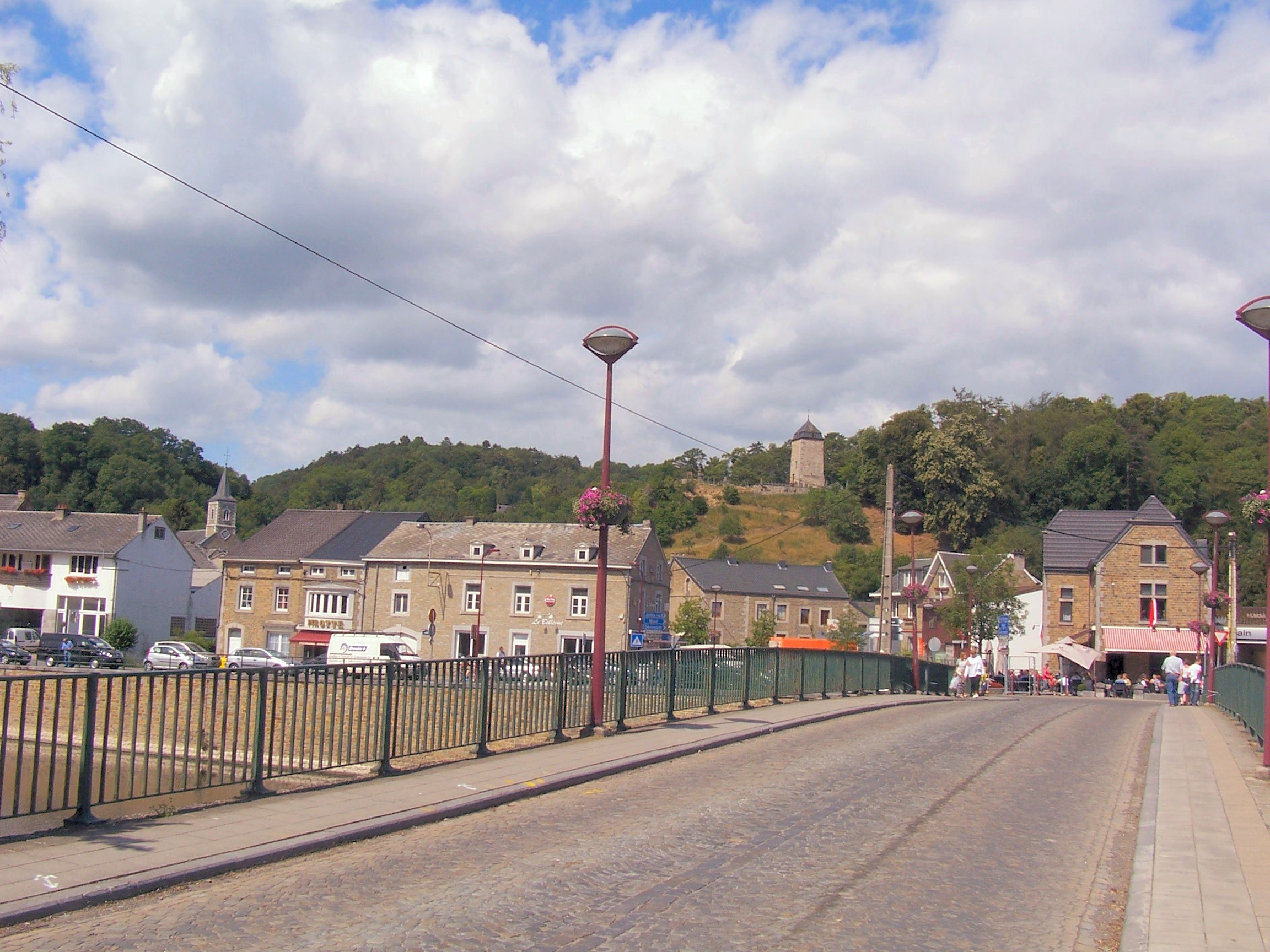 Zicht op Comblain-au-Pont.